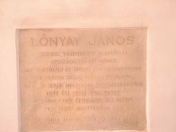 Lónyay János sírtáblája a lónyai kriptában